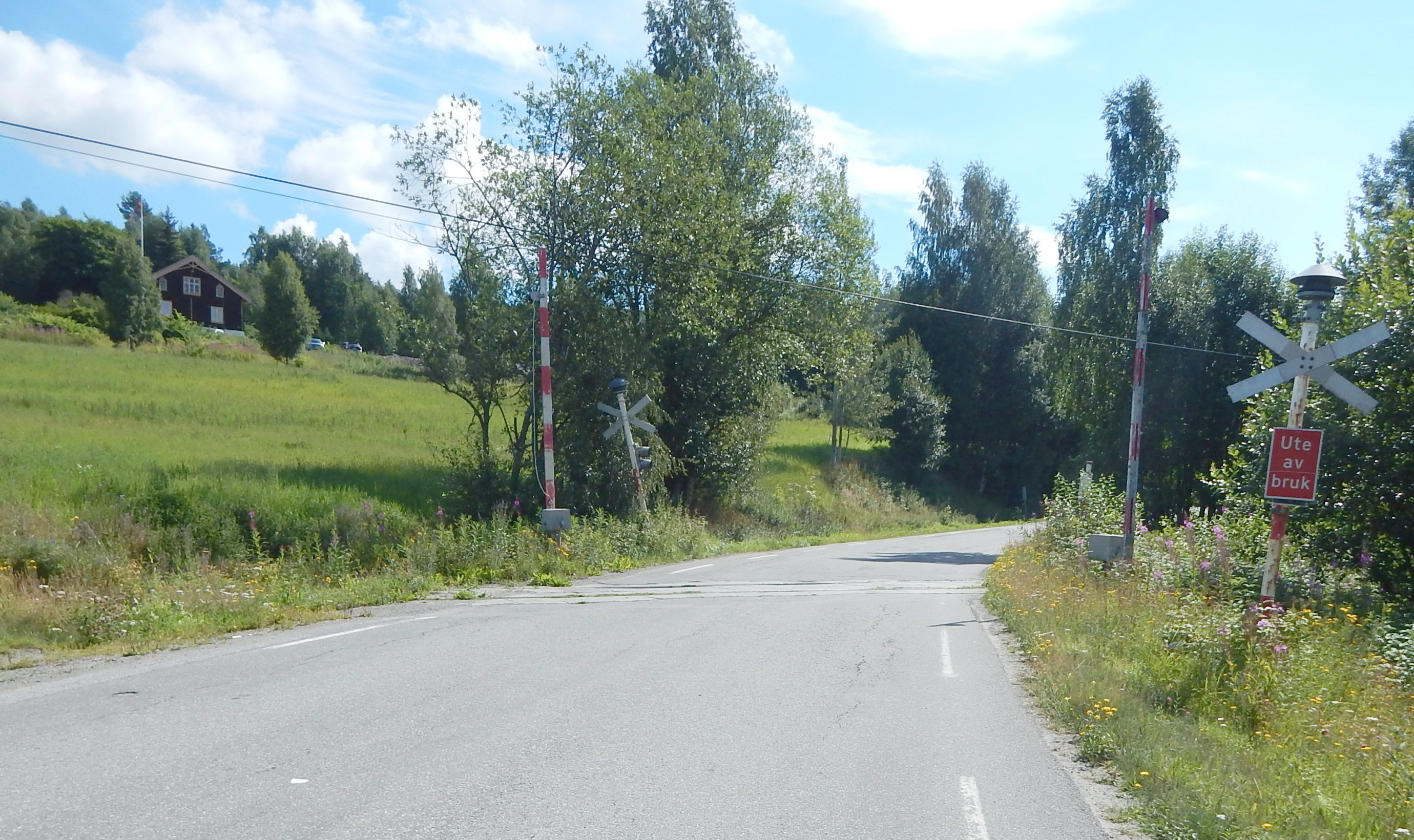 Fylkesvei 2394 (tidl. 139) krysser Valdresbanen på planovergang.